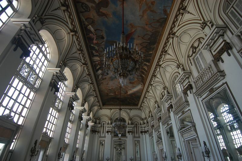 Havana, sept 2005